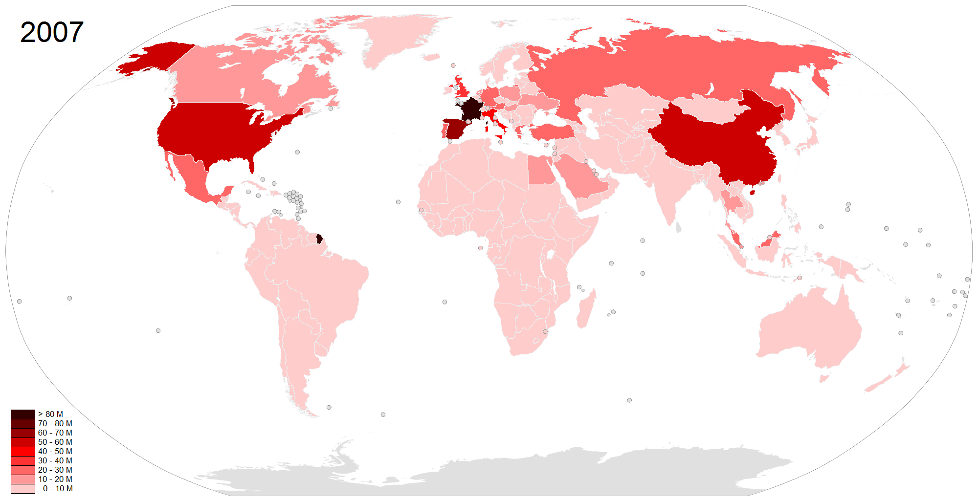 Touristes par pays en 2007.